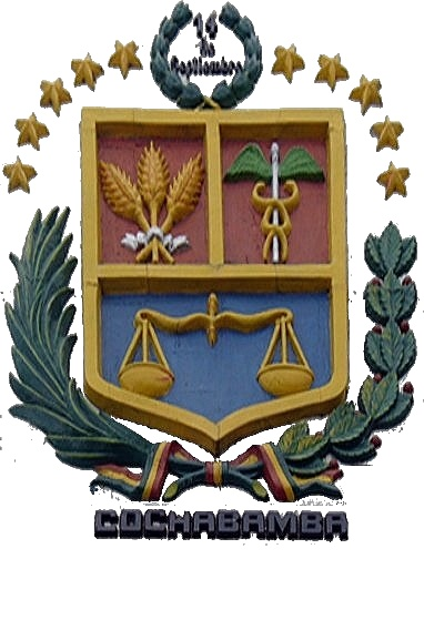 Imágen del escudo del Departamento de Cochabamba.